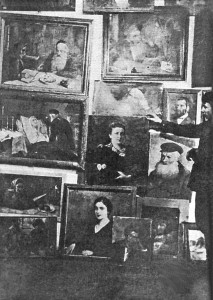 Мастерская Юделя Пэна